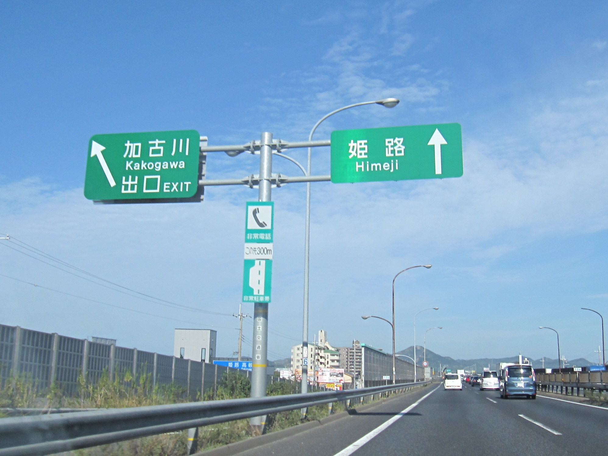 加古川ランプ案内板